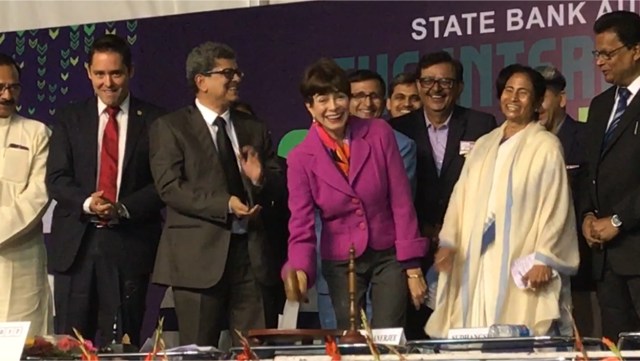 Roxana Pinto (centro) junto con la política Mamata Banerjee y el poeta Nirendranath Chakraborty en la inauguración de la Feria Internacional del Libro de Calcuta (enero, 2017)